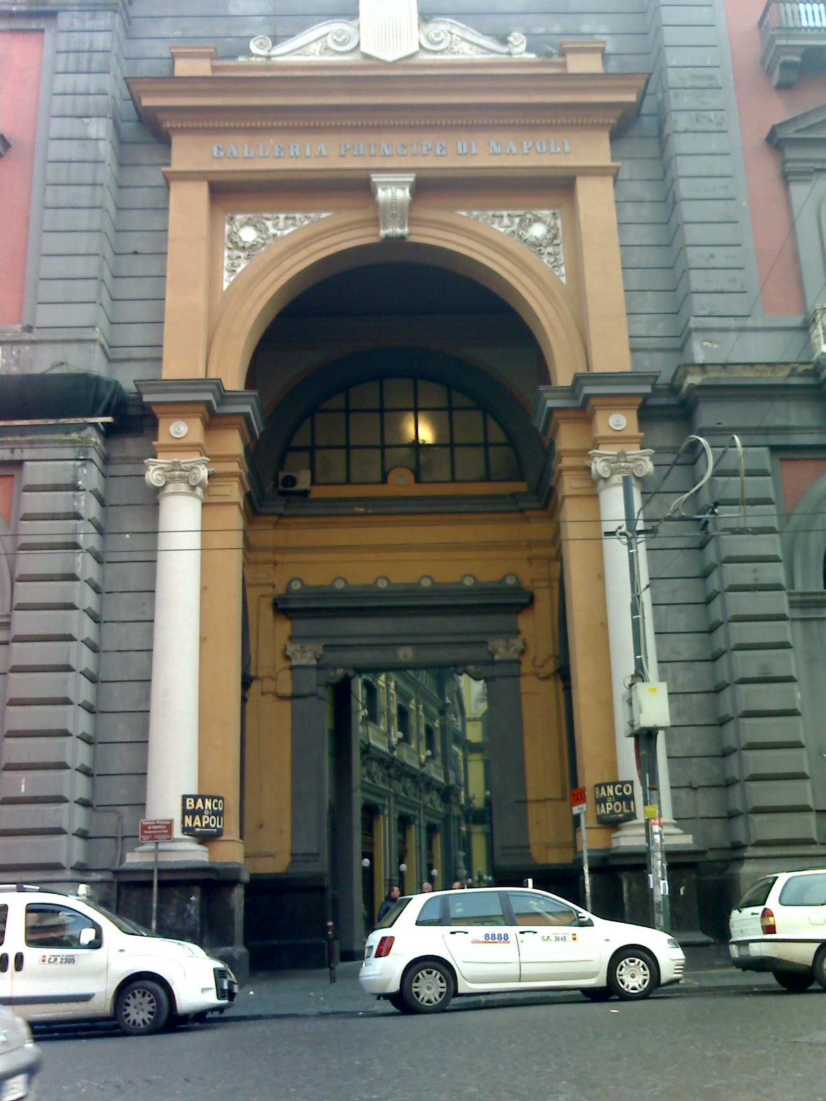 Galleria Principe, Napoli. Ingresso di fronte al Real Museo Archeologico Nazionale.